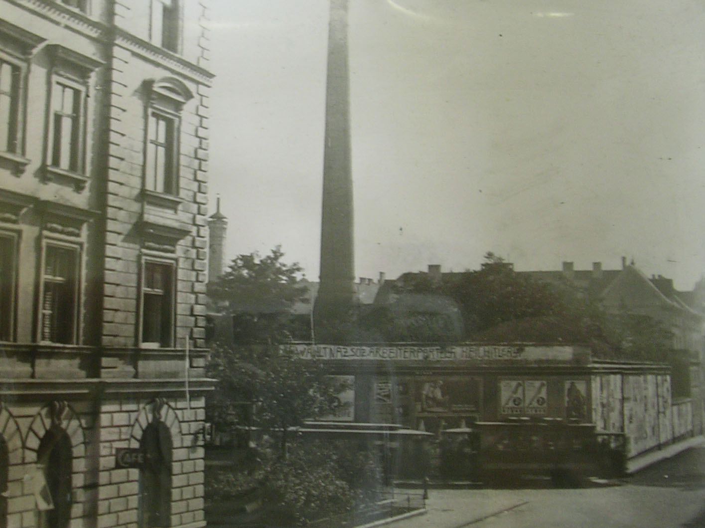 Brewery in Döbling (Döbling)